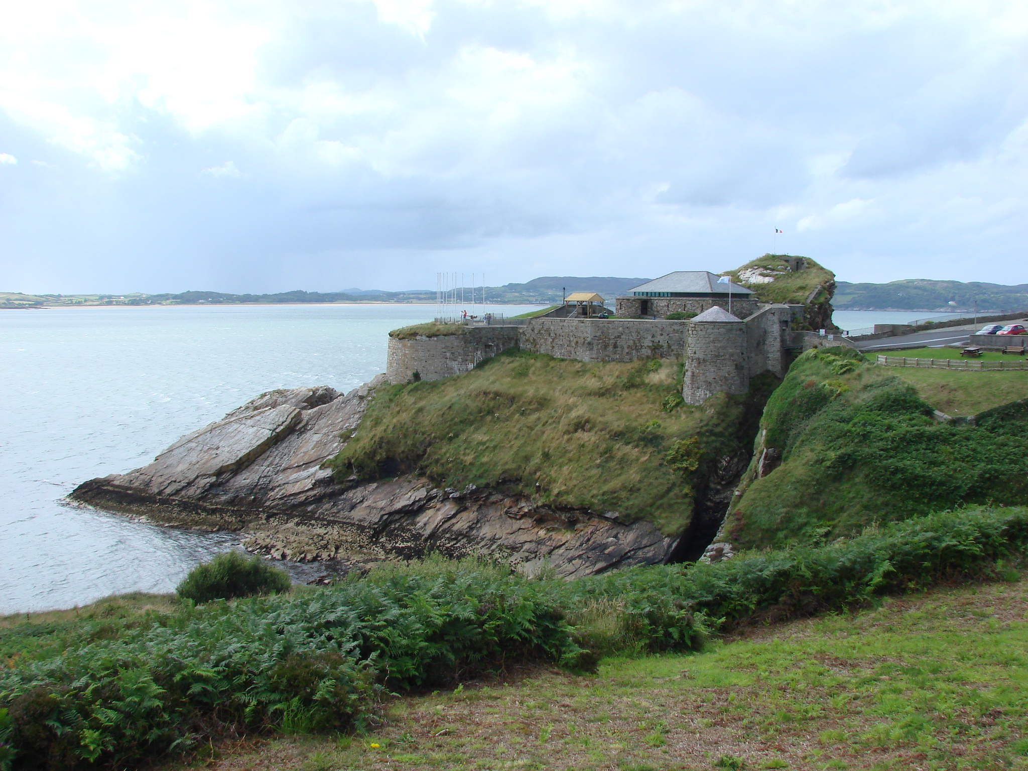 Dunree Fort